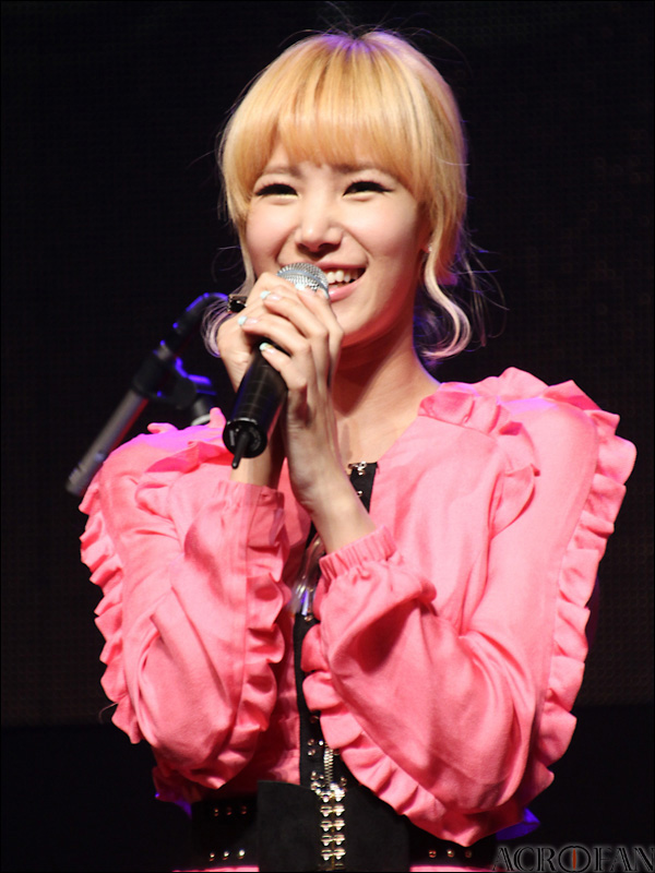 tvN '오페라스타 2011' 쇼케이스